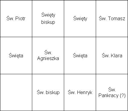 opis pól dawnego ołtarza głównego kościoła św. Jana w Stargardzie Szczecińskim.